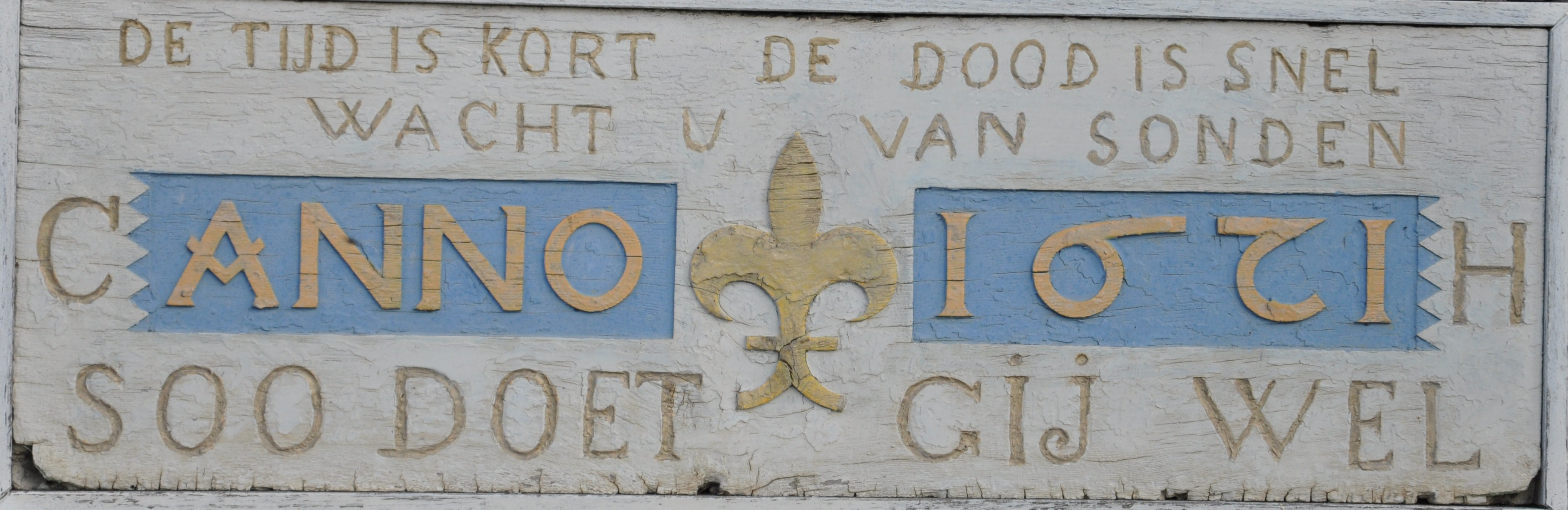 Bordje aan boerderij Welgelegen in Willeskop.